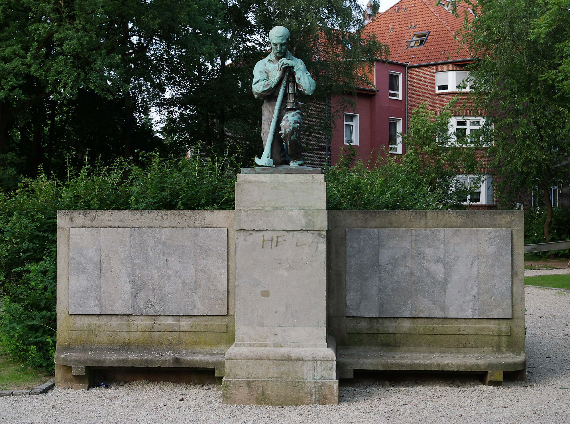 Denkmal, das in Erinnerung an das schwere Grubenunglück in der Zeche Radbod in Bockum-Hövel errichtet wurde